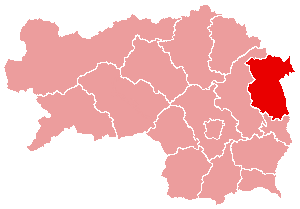 Karte: politischer Bezirk Hartberg Lizenz: GNU FDL Quelle: Zeichnung plp Datum: de:2004 Ort: Wien